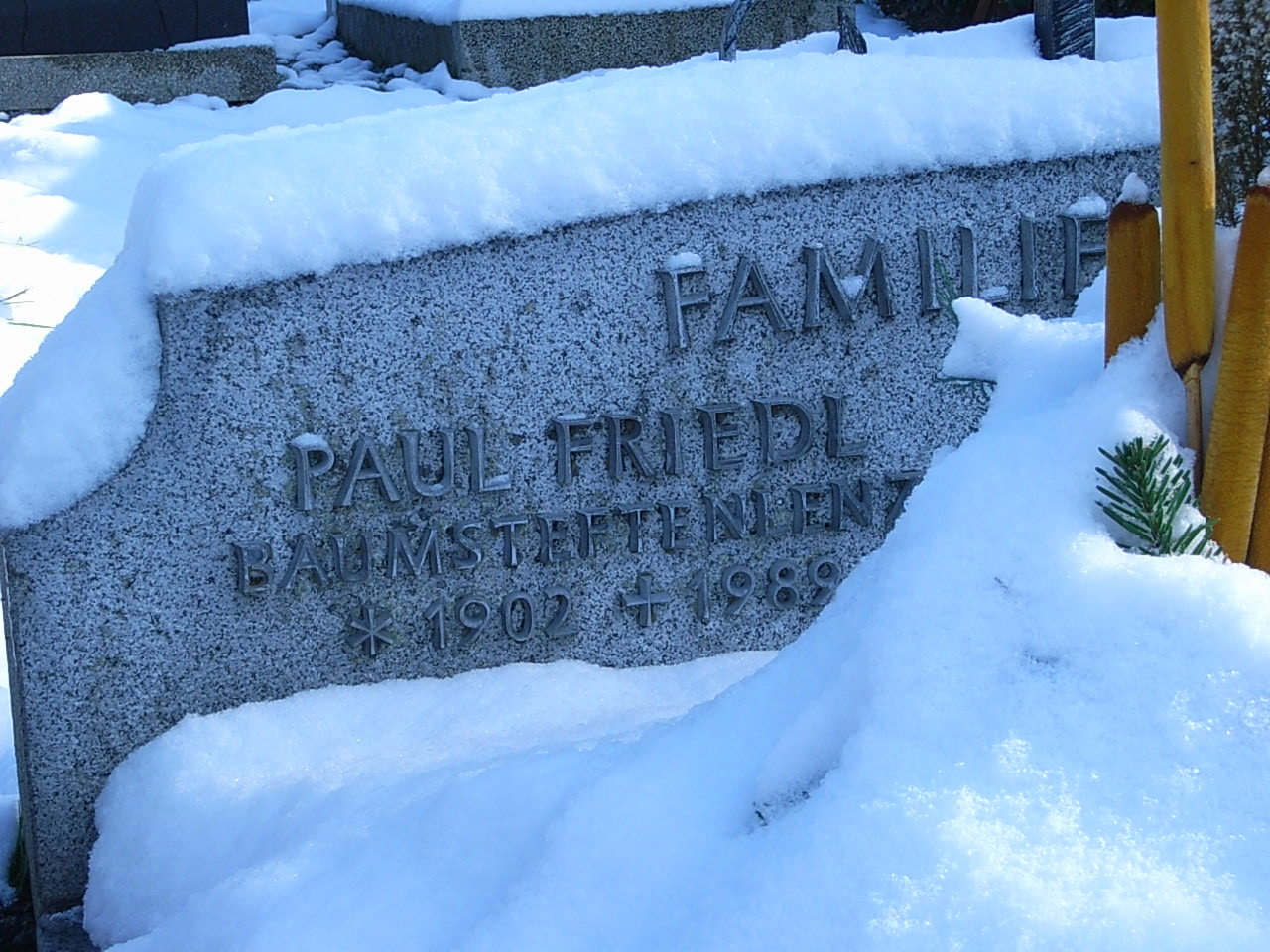 Beschreibung: Paul Friedls Grab in Zwiesel Quelle: Bild selbst erstellt Datum: 3. November 2006 Autor: Konrad Lackerbeck